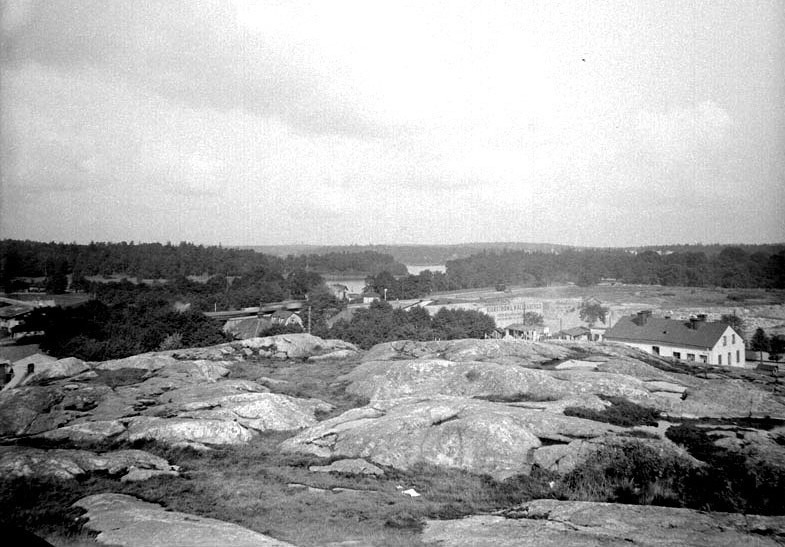 Utsikt från nuvarande Rödabergsskolan mot Norr med Norrtull och Norrtullsgatan med kvarteret Sländan närmast nedanför bergkanten. I bakgrunden Brunnsviken och Hagaparken.